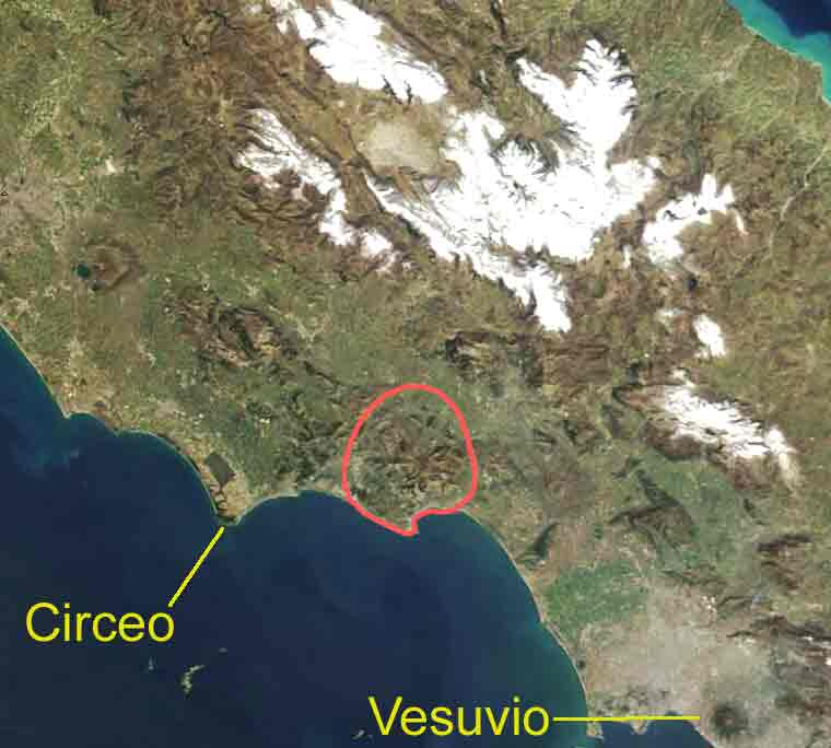 Aurunci mountains, Lazio, Italy